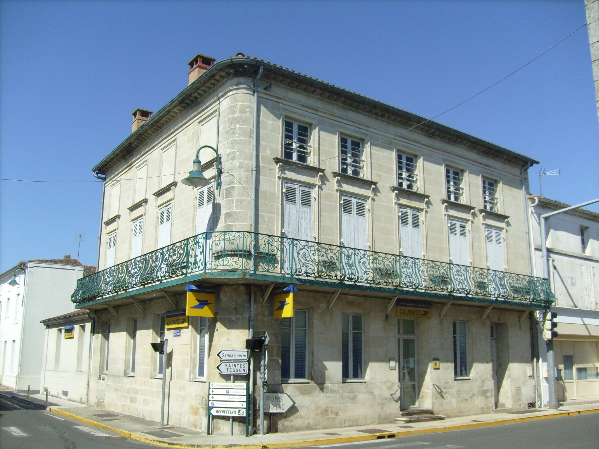 L'hôtel des Postes de Gémozac